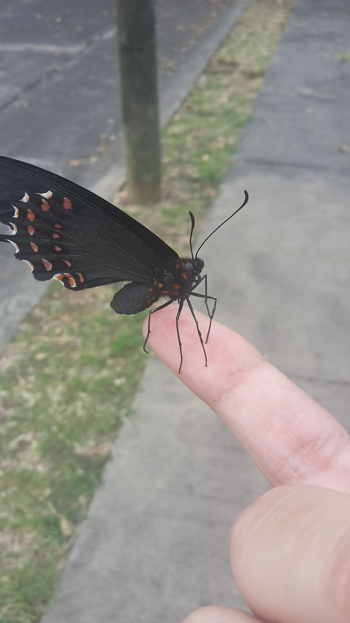 Papilo posándose sobre un dedo